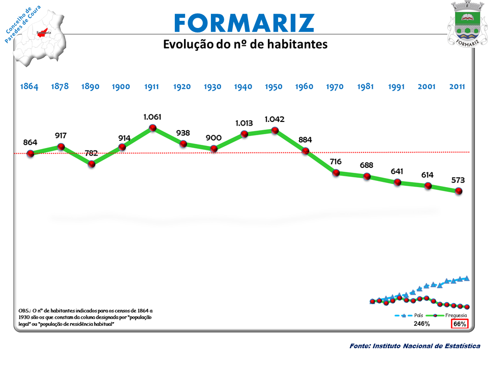 Censos 1864/2011